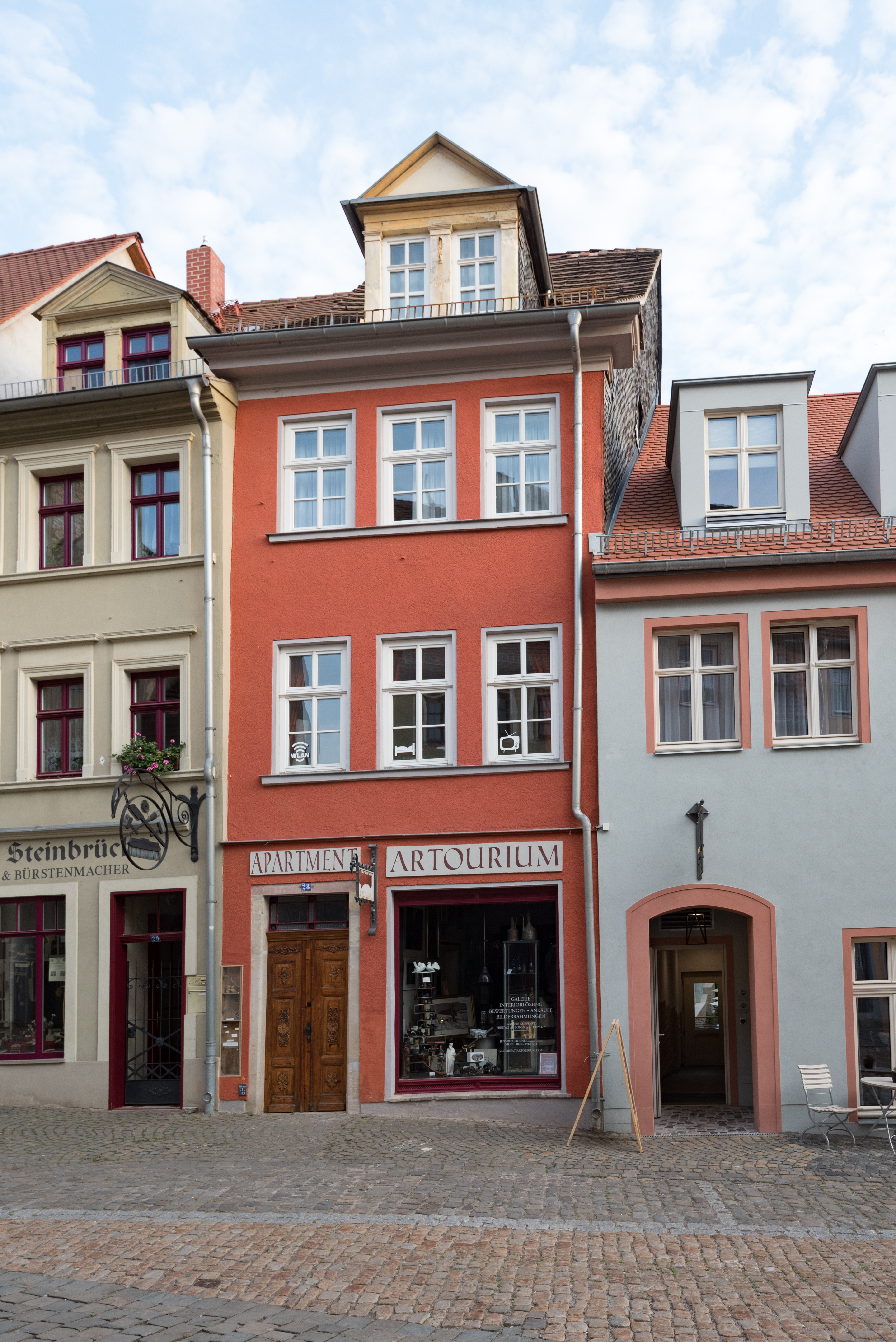 Naumburg (Saale), Steinweg 28